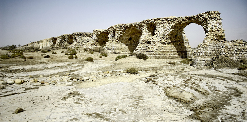 پل تاریخی لاتیدان